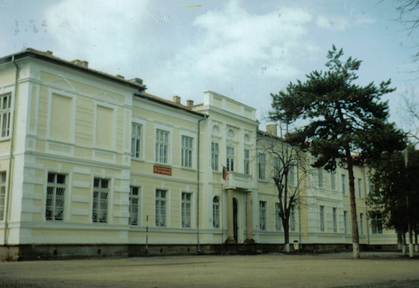 СОУ "Св. Климент Охридски" - Ловеч